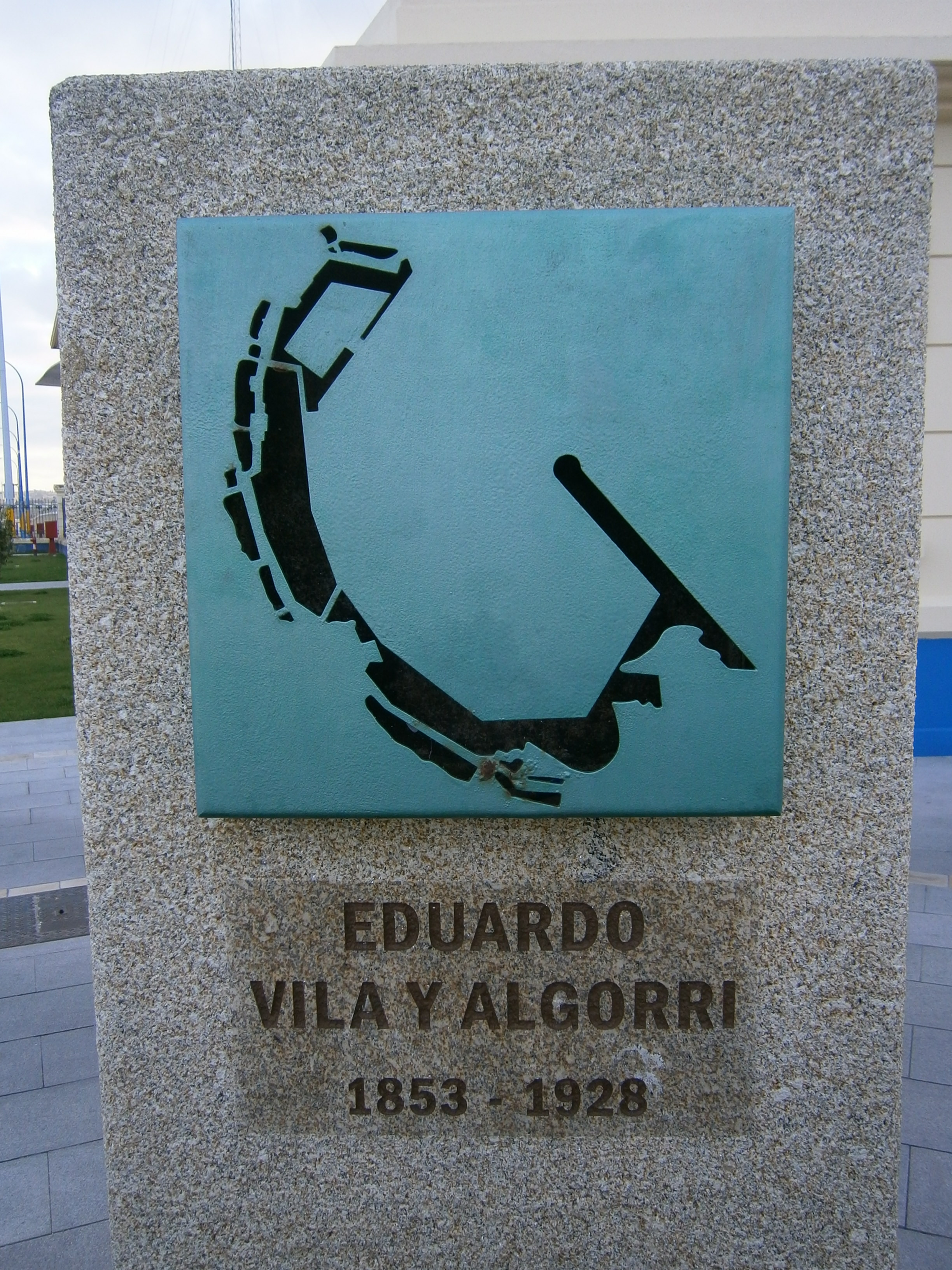 Placa coa ampliación do porto da Coruña do enxeñeiro Eduardo Vila